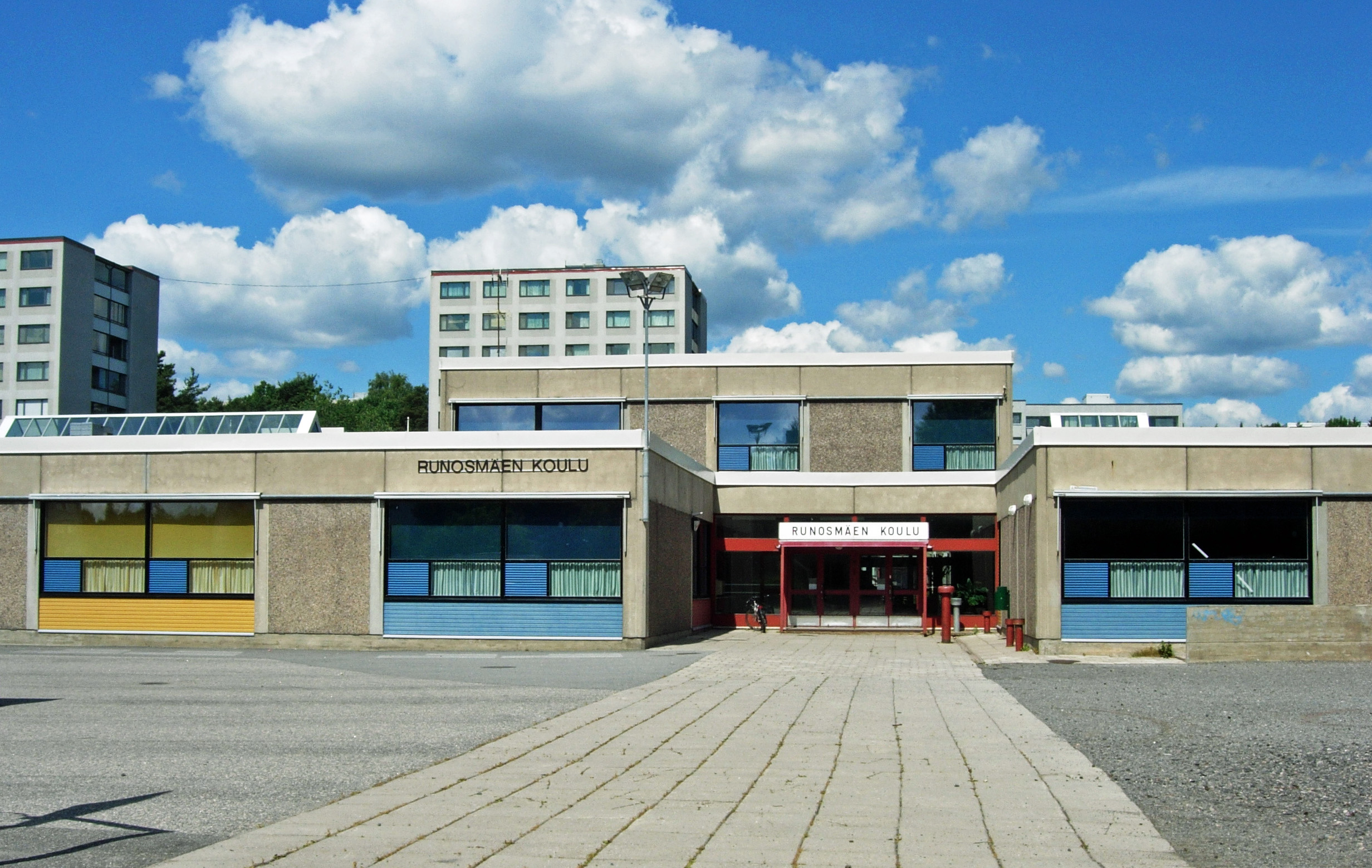 Runosmäen koulu, Runosmäki, Turku. Myös kirjasto ja päiväkoti. Pekka Pitkänen 1977–1979. Lakkautettu 2015.